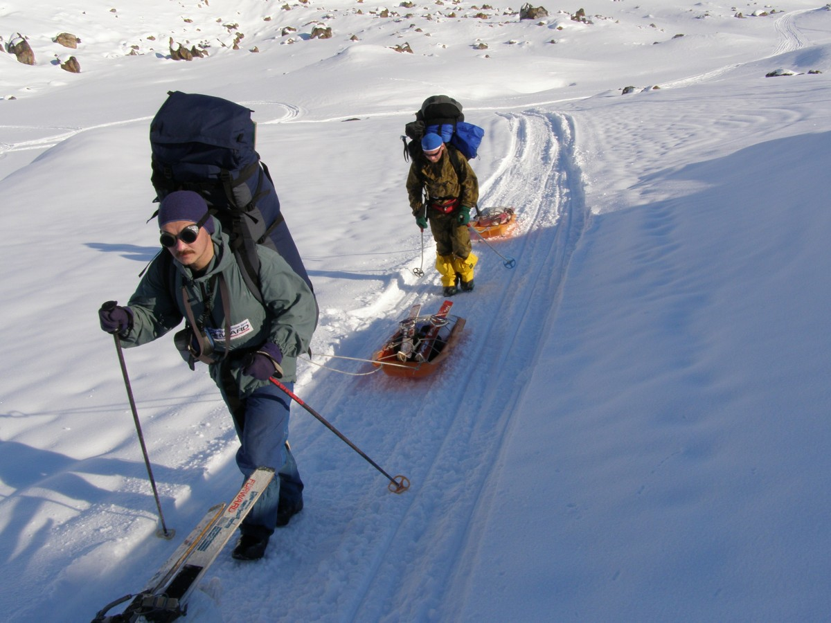 Андрей Королёв. Путешествие по Гренландии, 2010 год.